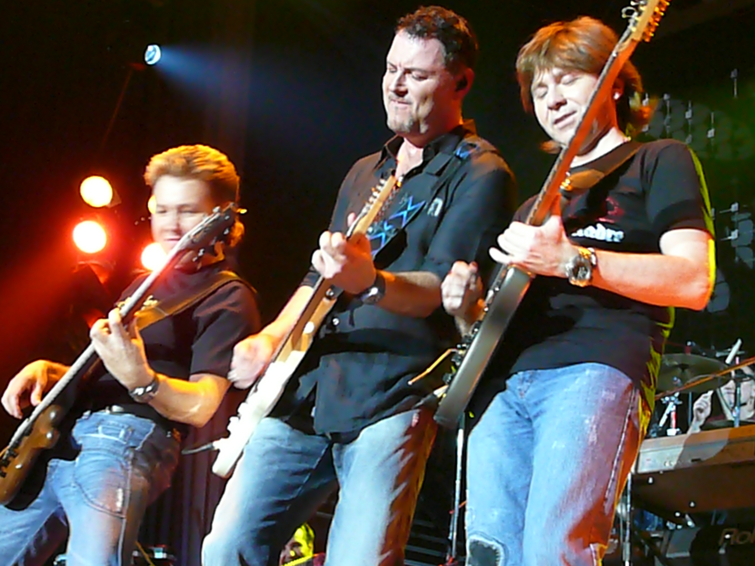 Гигант-Холл